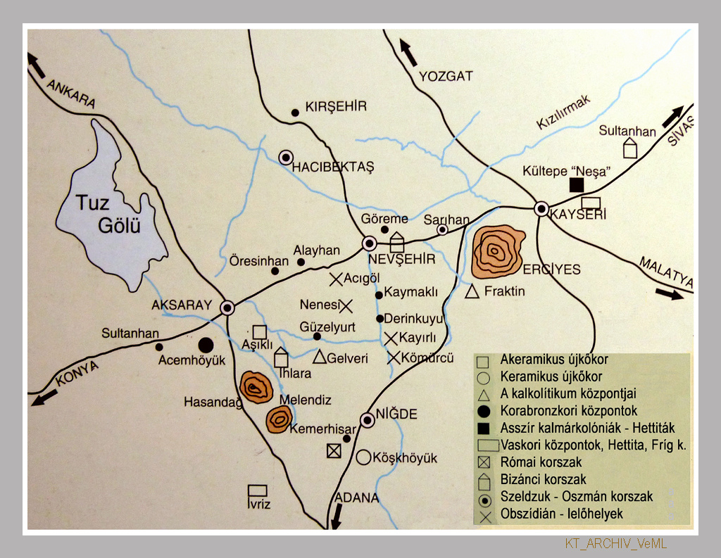 Kappadókia, Göreme Nemzeti Park: térképvázlat (Törökország)